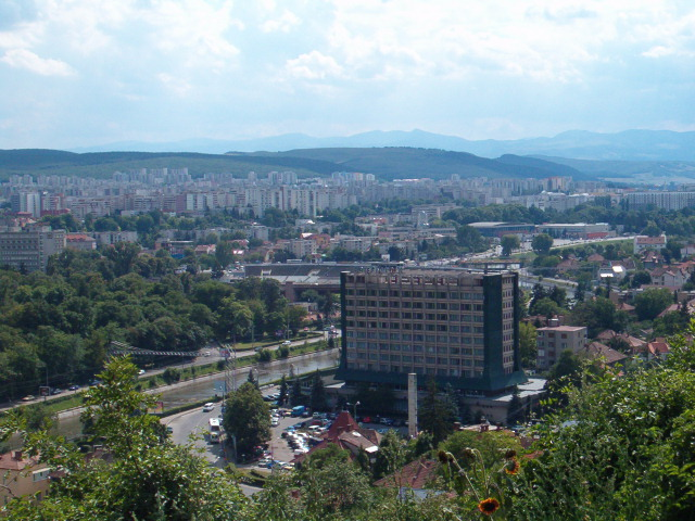 Kolozsvár: előtérben Napoca szálló háttérben Monostor negyed